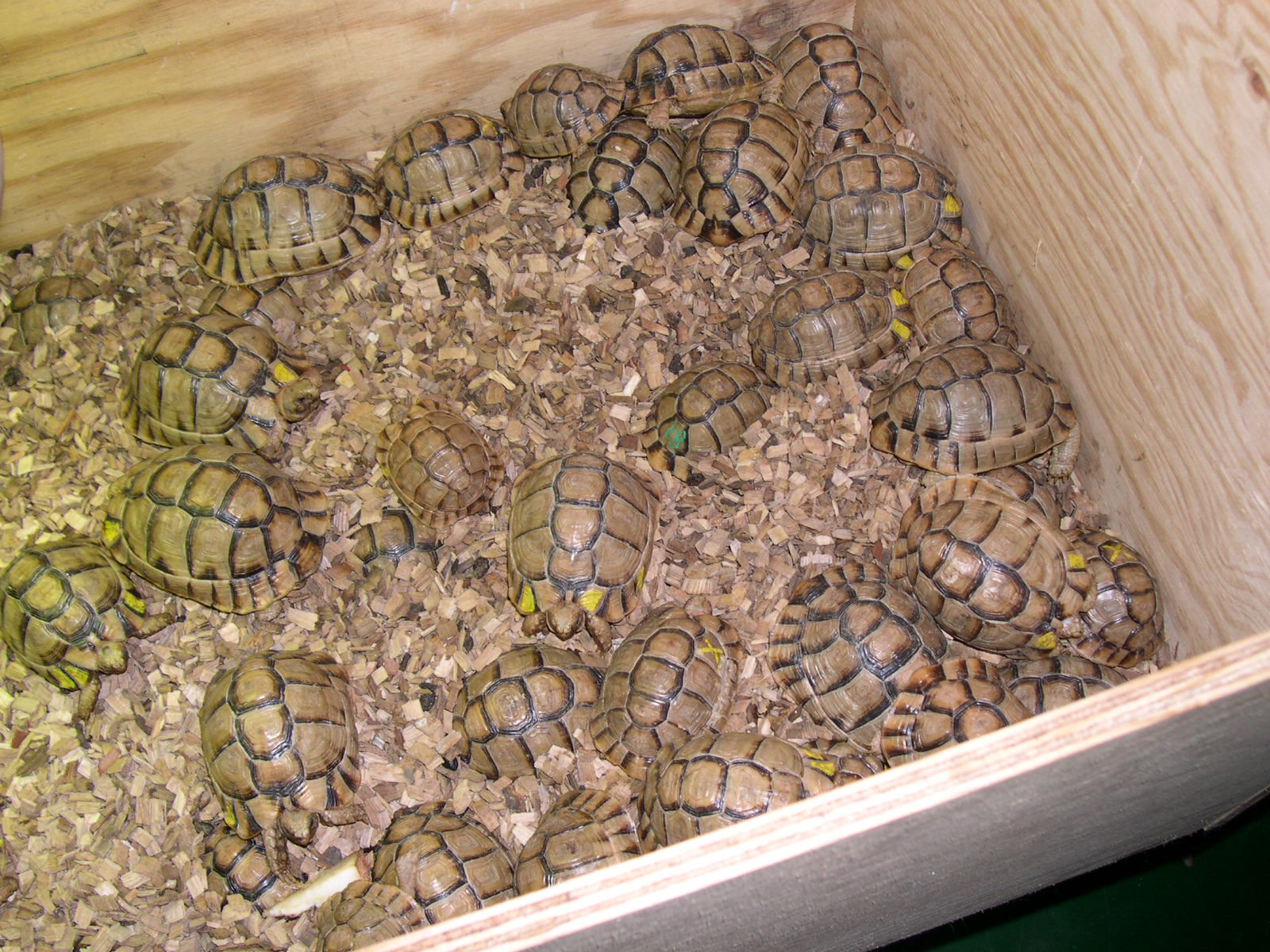 Da sequestro effettuato dal Corpo Forestale dello Stato nel 2006, su una nave cargo attraccata al Porto di Genova e proveniente dall'Africa mediterranea, momentaneamente affidate alle cure dei guardiani del rettilario del Bioparco di Roma